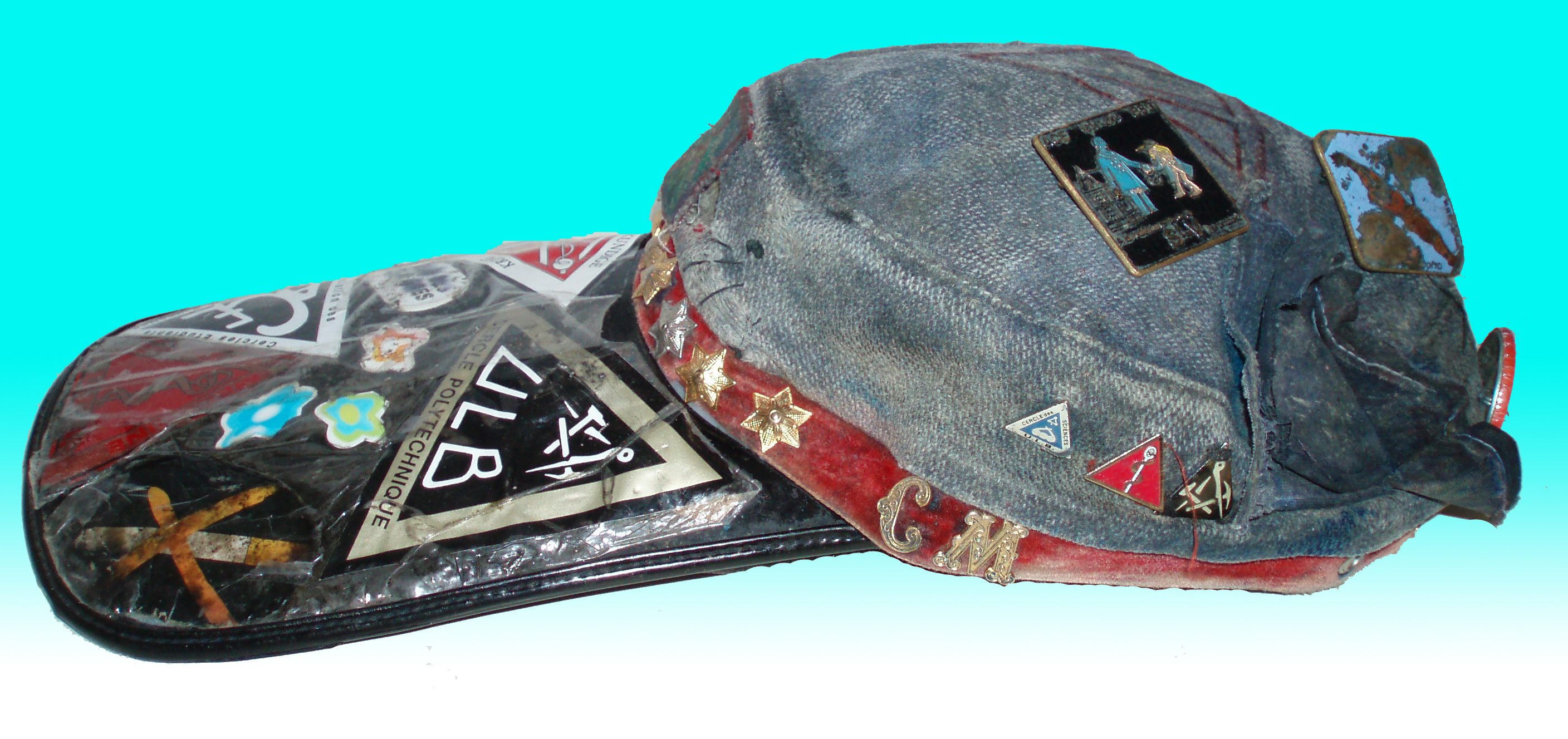 Penne aux couleurs du cercle de médecine (CM) de l'université libre de Bruxelles.